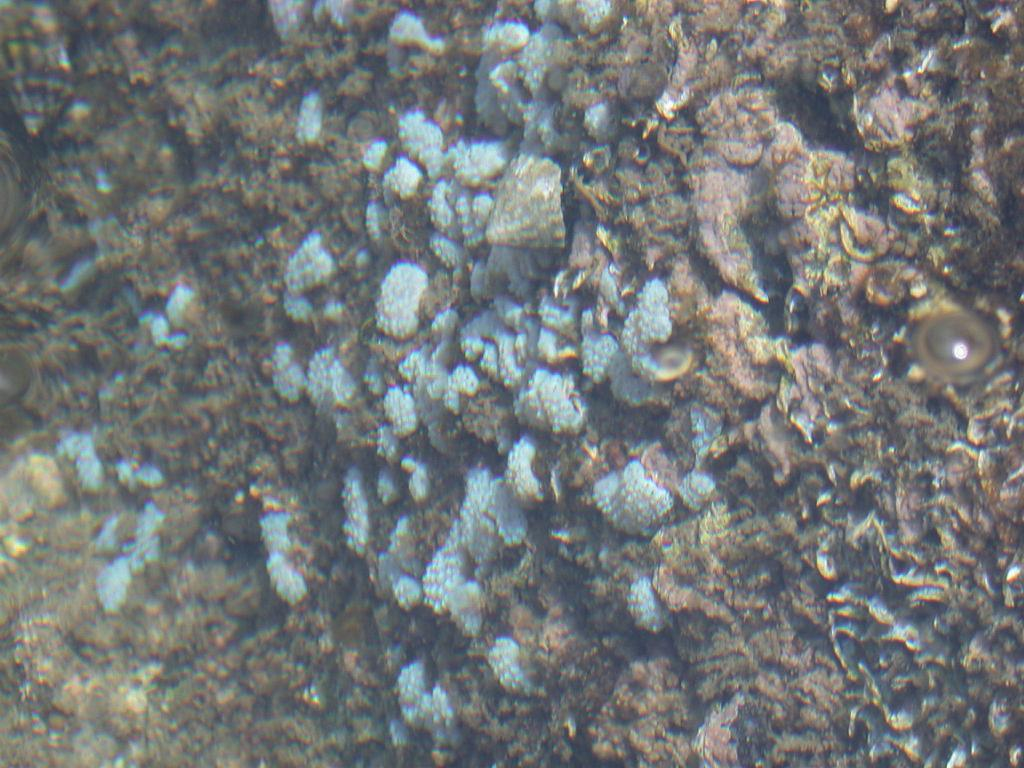 Polycitor proliferus：ヘンゲボヤ 2008/05/23 和歌山県田辺市：Tanabe City, Wakayama Pref. Japan